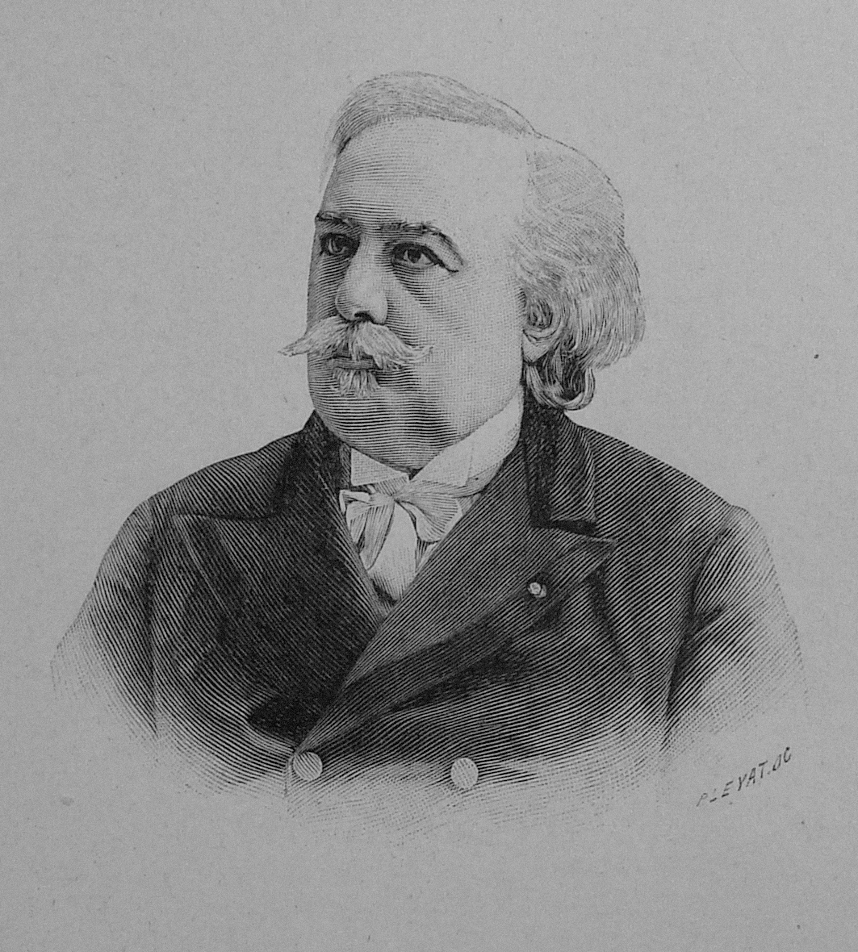 Hector France, gravure d'après photo dans Figures contemporaines Album Mariani tome VII, 1902. Graveur P. Leyat.